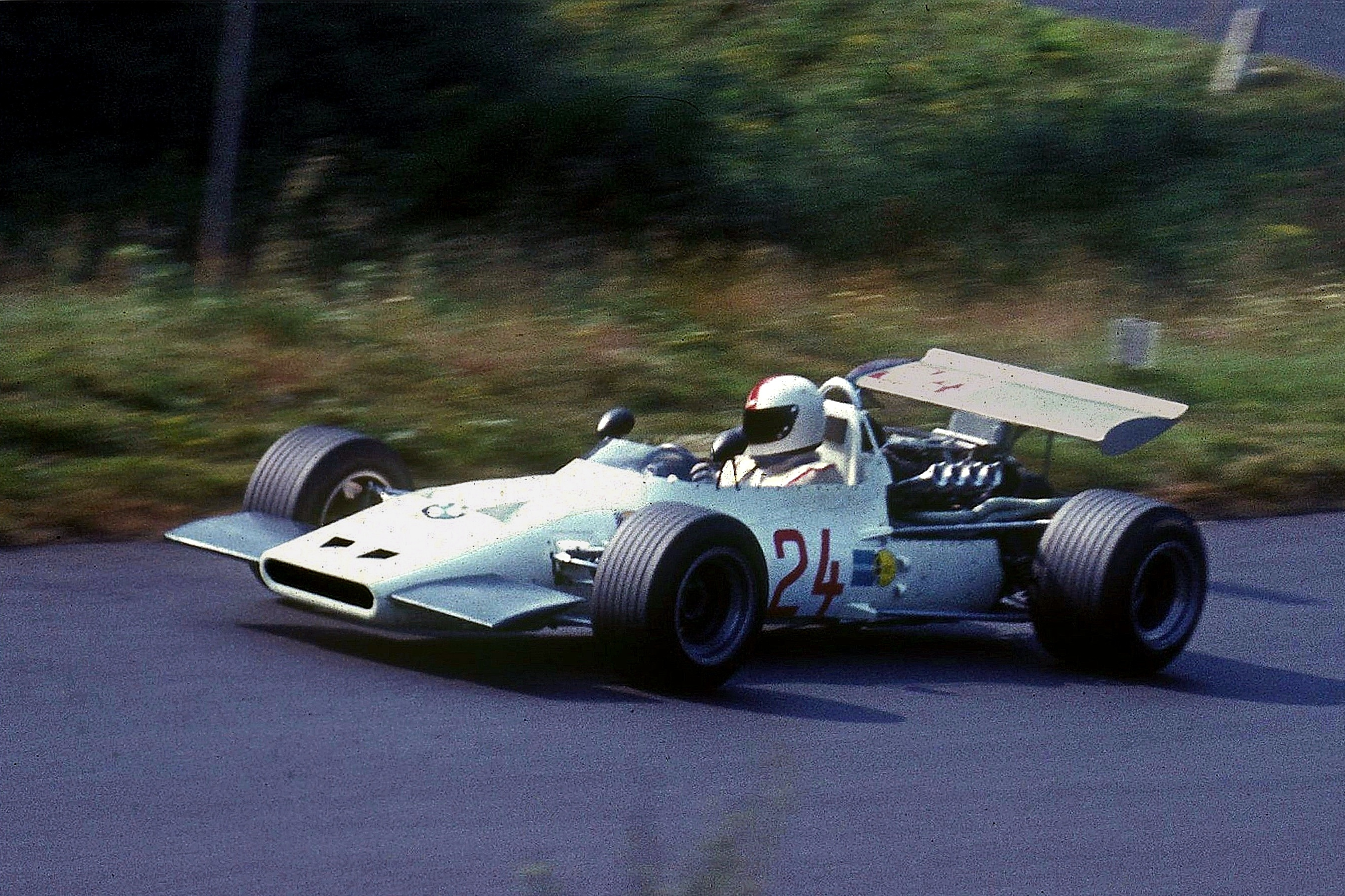 Bildbeschreibung: Gerhard Mitter im BMW Formel 2 (BMW 269) Fotograf: Lothar Spurzem Datum: 01.08.1969 auf dem Nürburgring